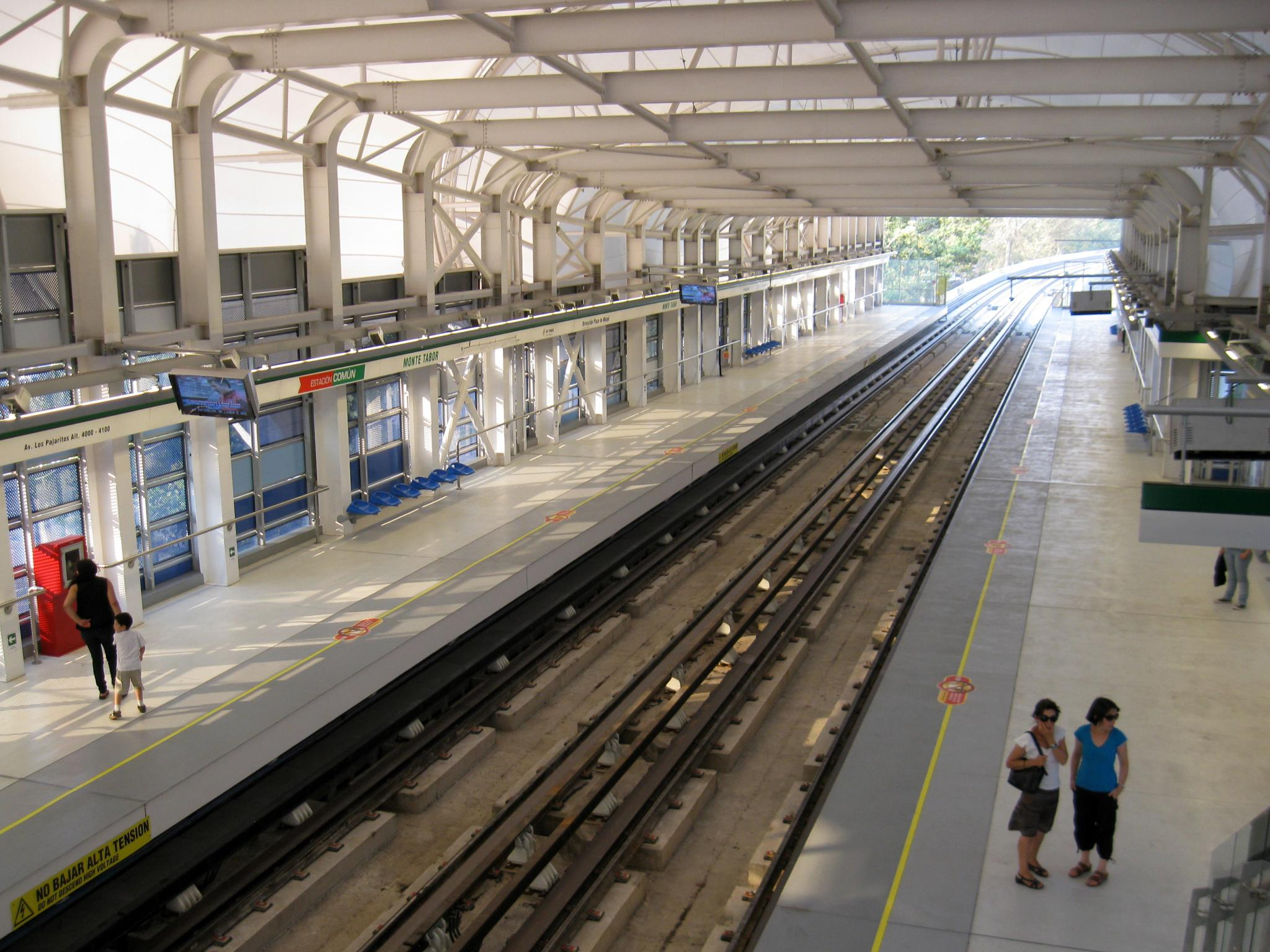 Extensión Poniente Línea 5: Febrero 2011